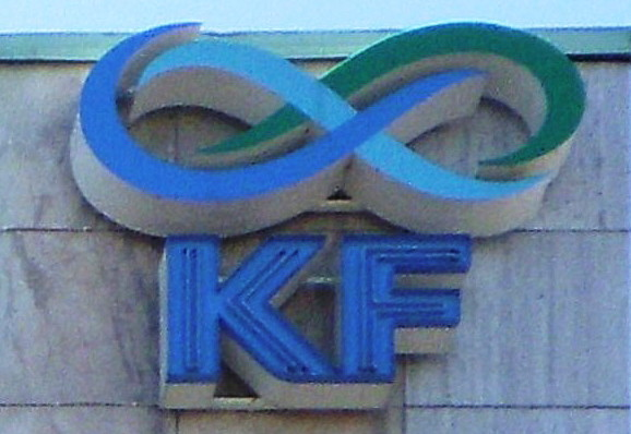 Kooperativa Förbundets skylt vid Slussen